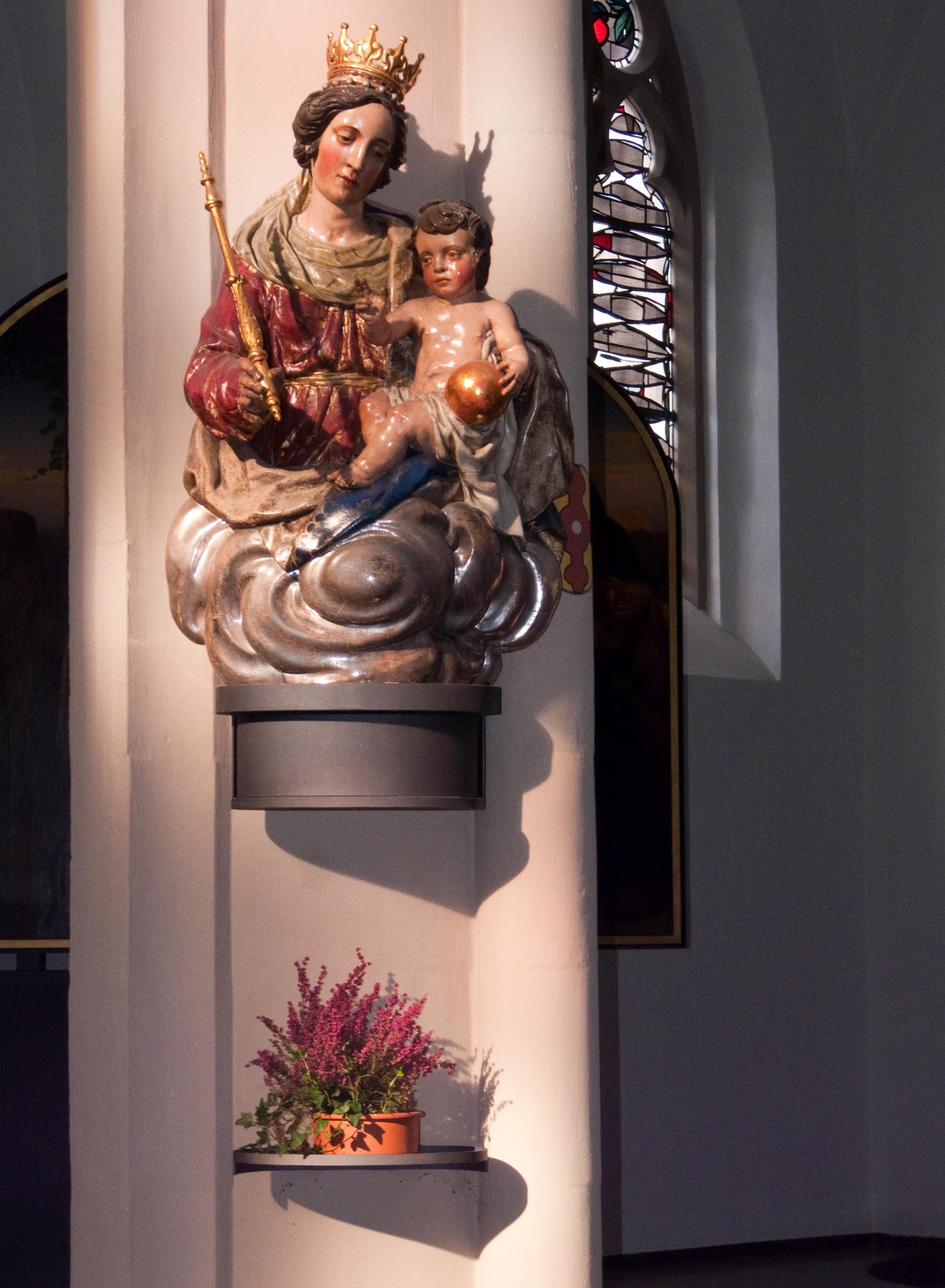 Halbfigur der gekrönten Mutter Maria in der Remigiuskirche Bonn